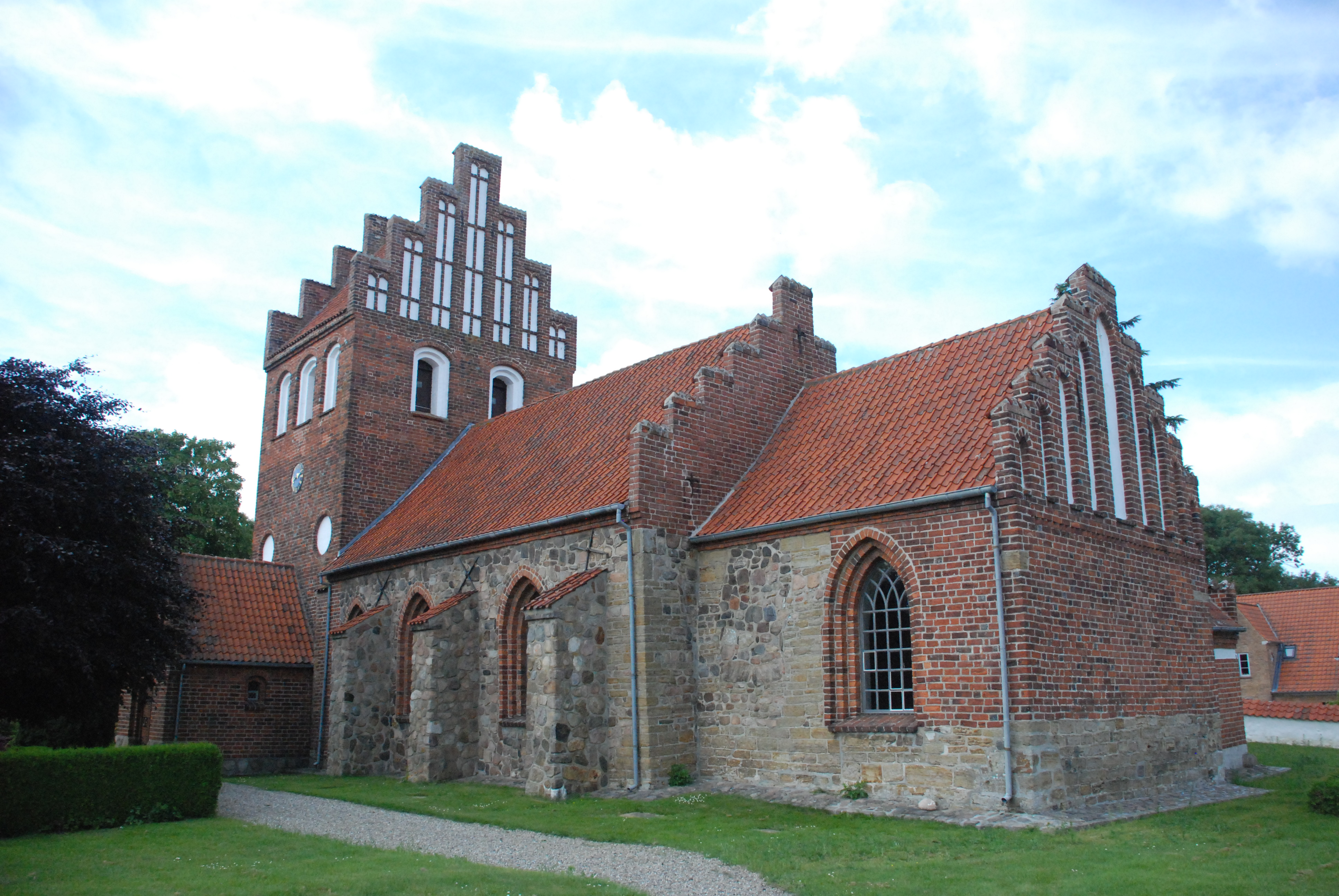 Esbønderup Kirke, Esbønderup Sogn, Holbo Herred, Frederiksborg Amt, Danmark.